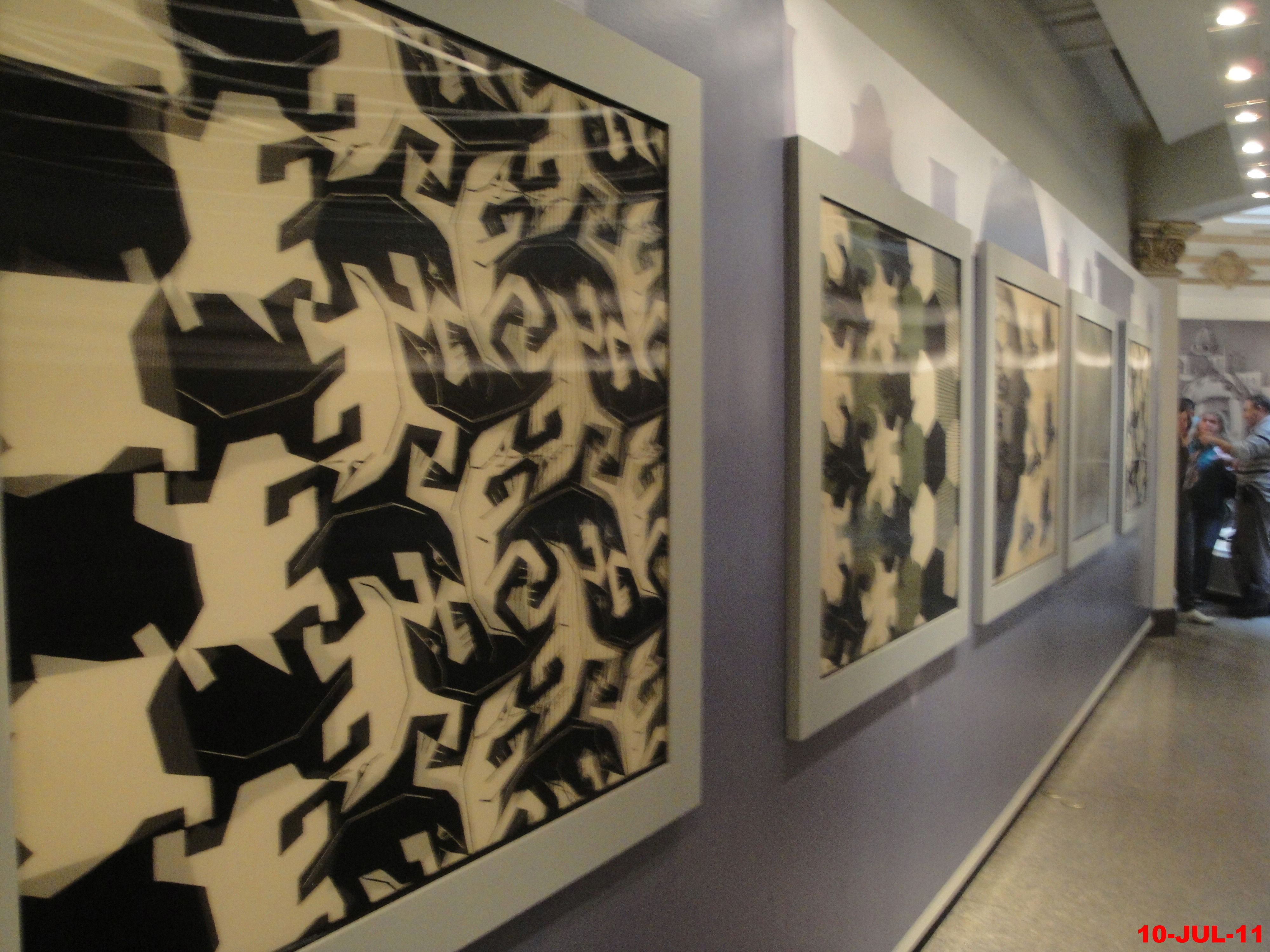 Vários quadros de Escher com efeitos de animação no Centro Cultural Banco do Brasil expondo " O Mundo Mágico de Escher"